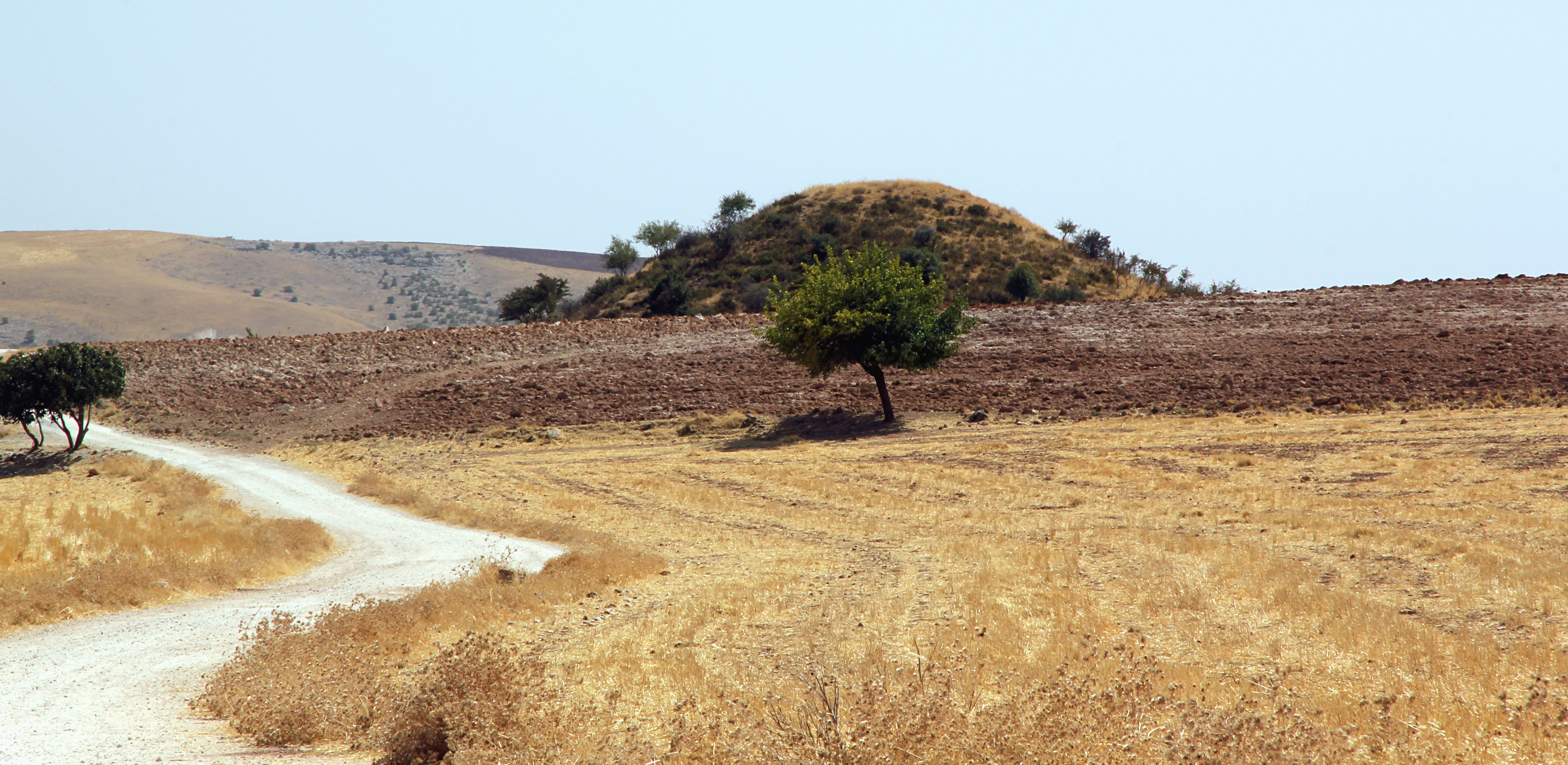 Tumulus A von Sofraz mit Kammergrab, Umgebung von Besni, Südosttürkei